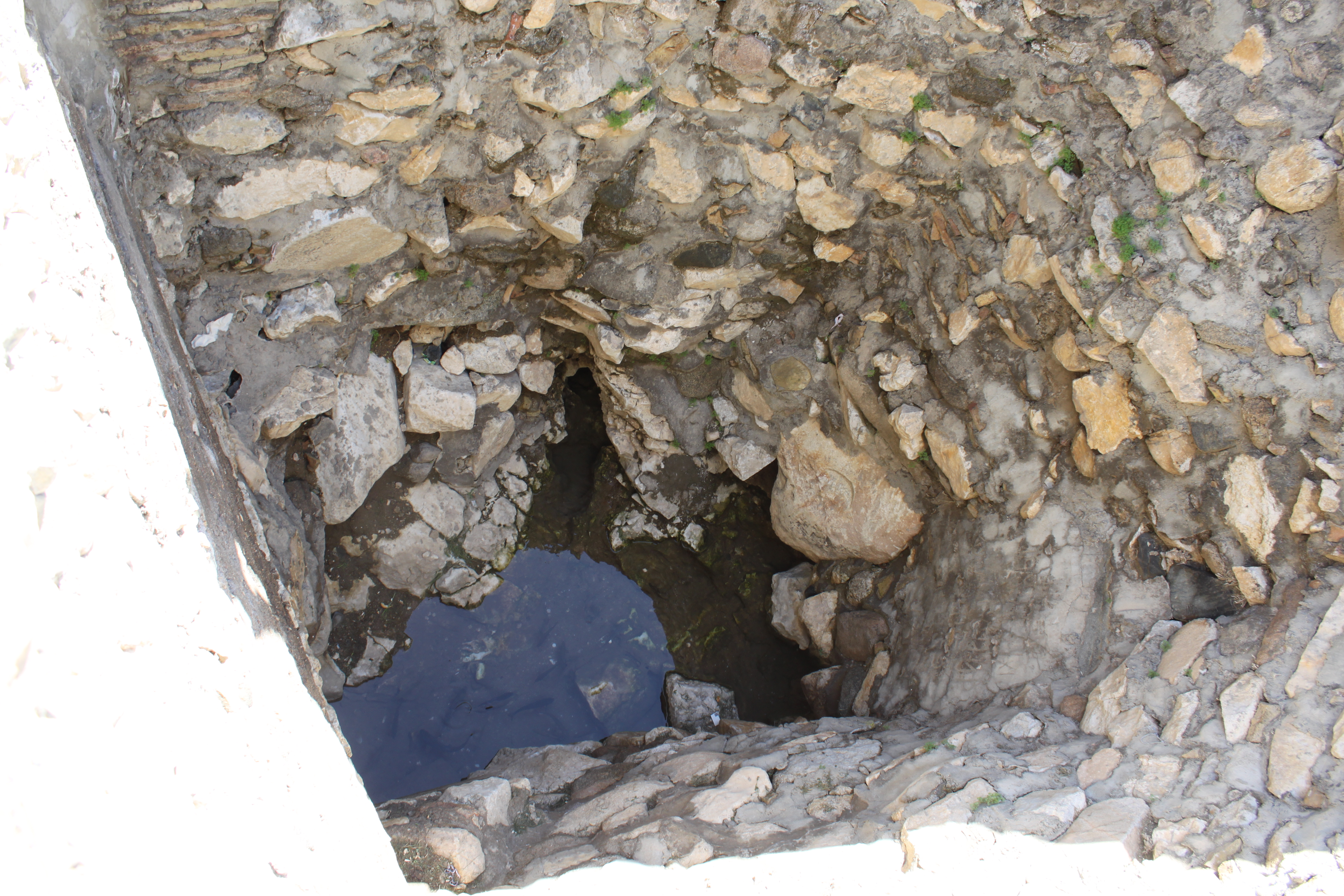 Le puits sur le site de la source Tchachma à Nourata